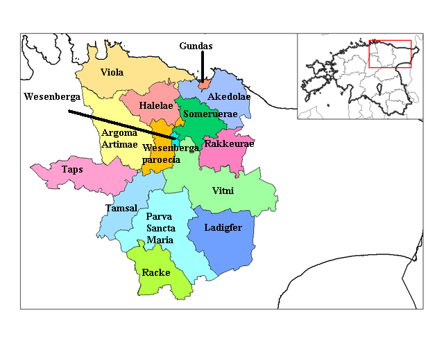 Vironiae Occidentalis municipia Latine